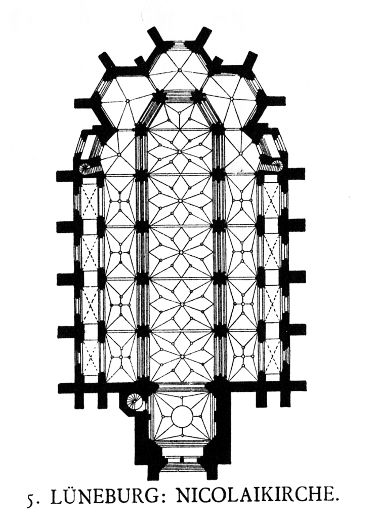 Lüneburg, Nikolaikirche